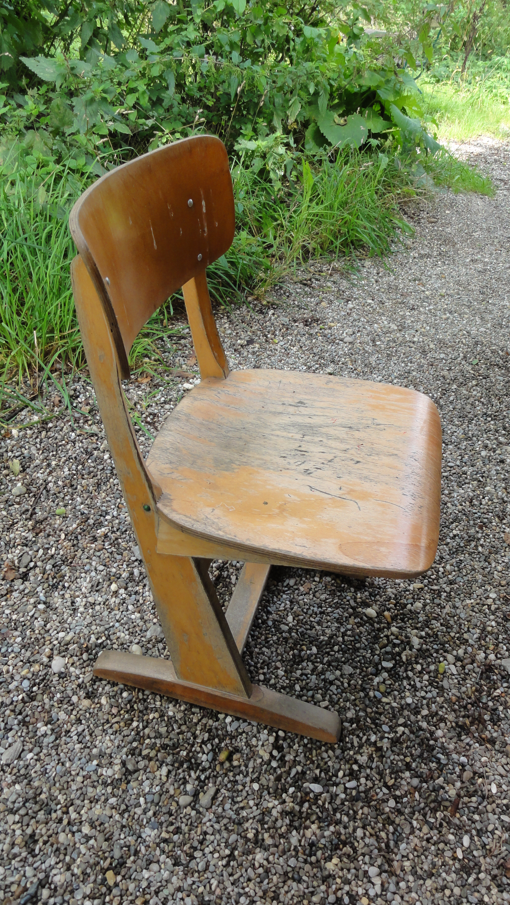 Schülerstuhl, Hersteller: Casala, Plakettenaufschrift: „Mustergültiges Schulgestühl“, Produktioszeitraum: 2/1988 (gem. Brandzeichen); Gr. 5